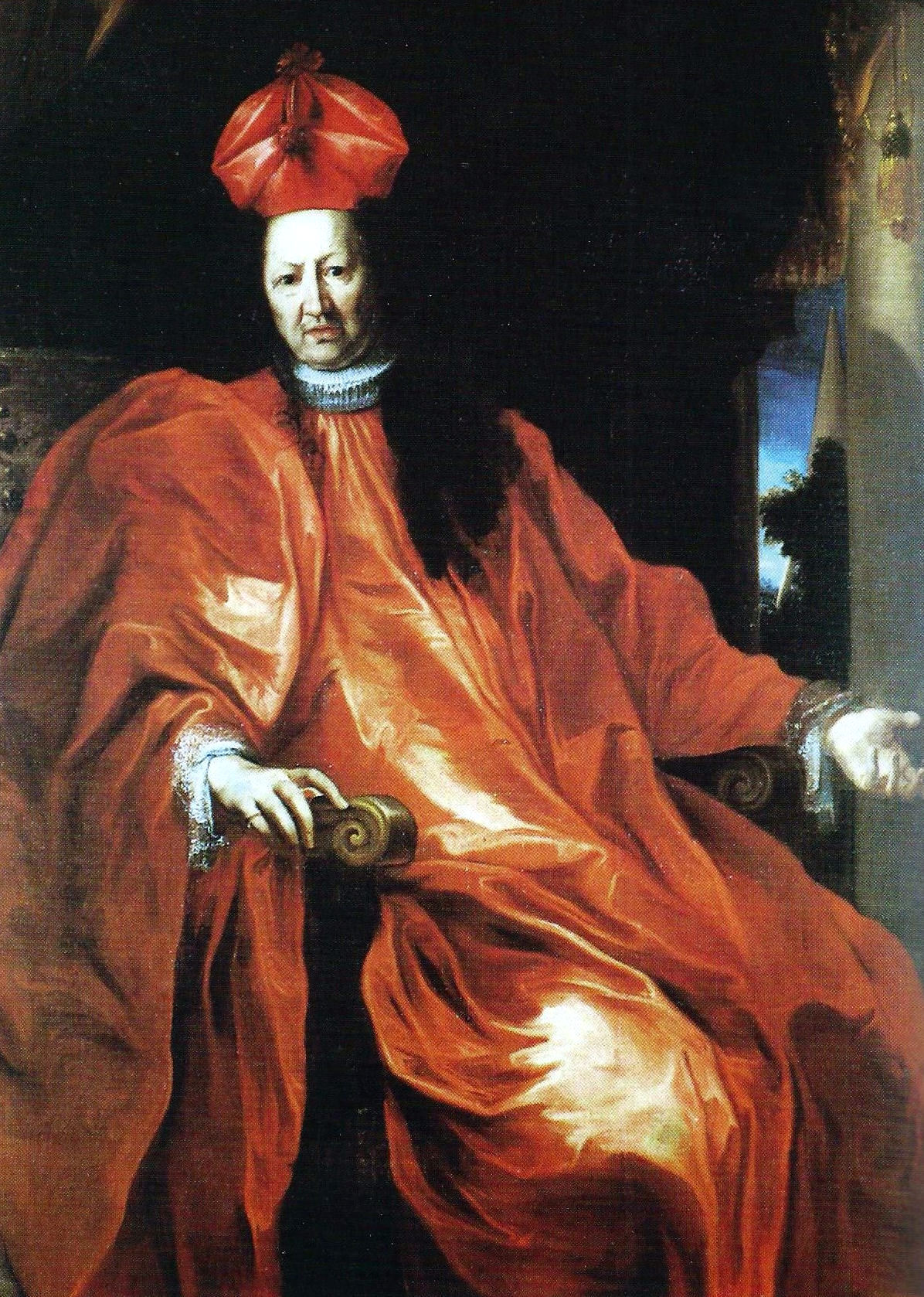 Ritratto del doge Francesco Maria Sauli (1620-1699)